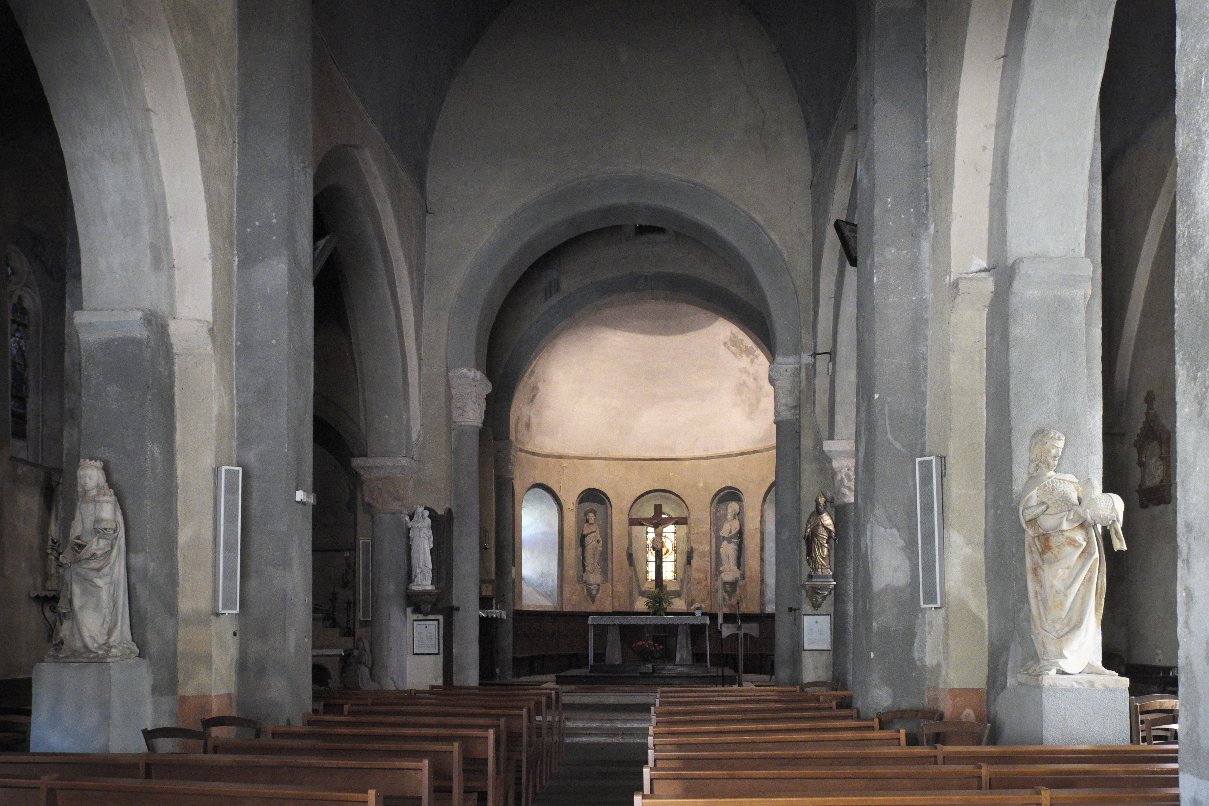 Katholische Pfarrkirche Saint-Hippolyte in Jaligny-sur-Besbre im Département Allier (Auvergne-Rhône-Alpes/Frankreich), Innenraum